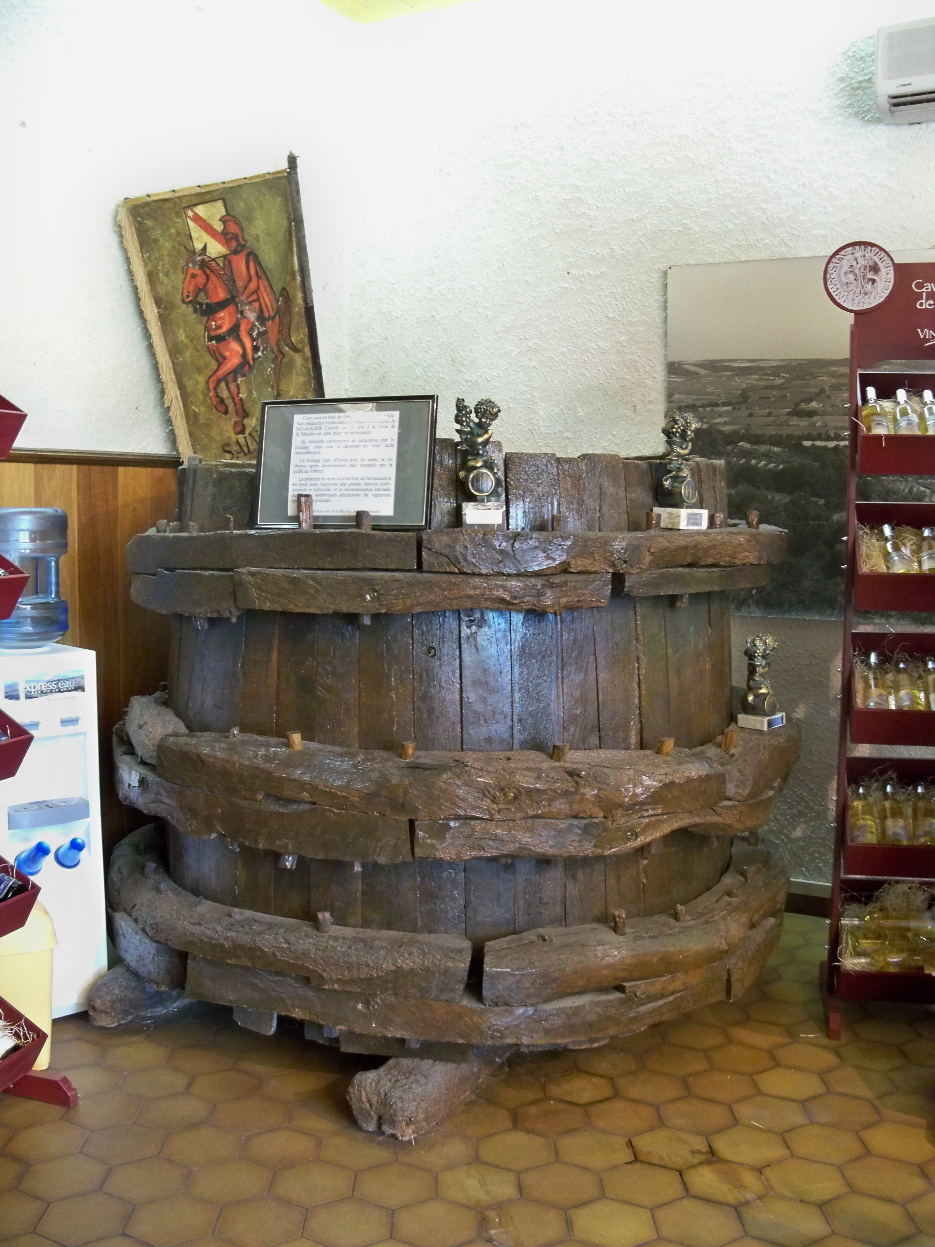 Tonneau du 13ème siècle à la cave de Saint Maurice sur Eygues, Drôme, France